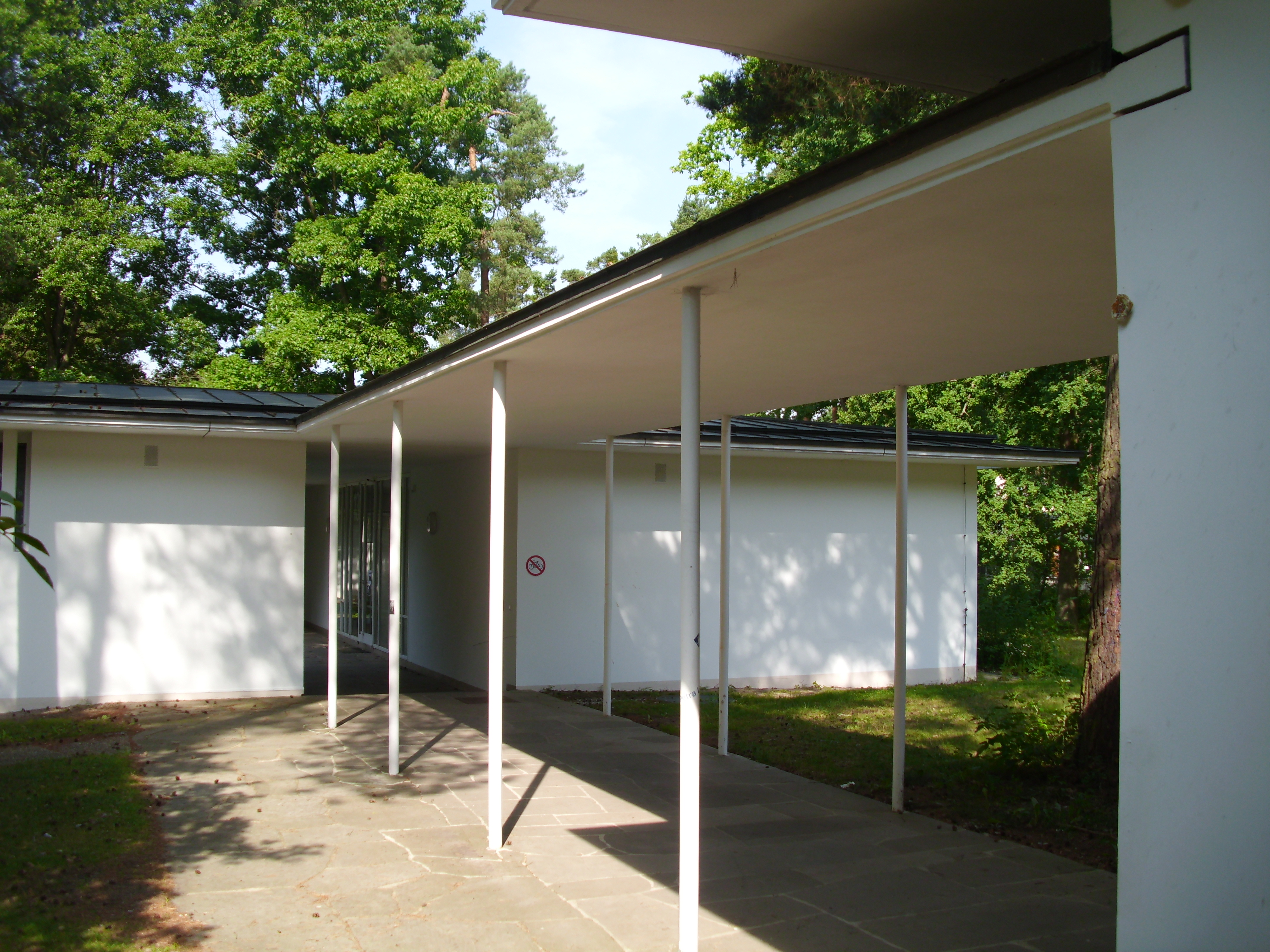 AKA Nürnberg